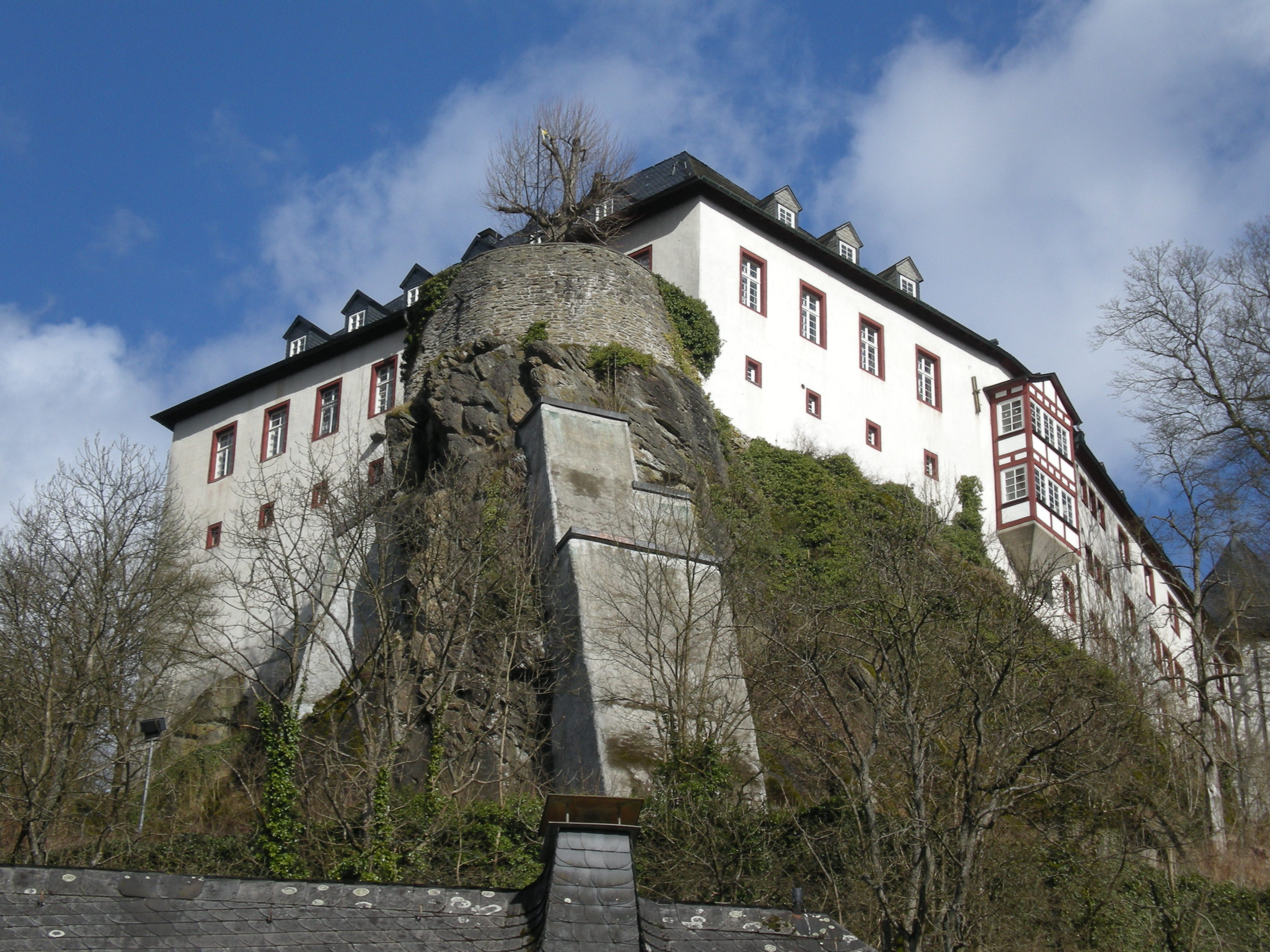 Ein anderer Blick vom Ort auf die Burg